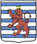 armoiries de la commune de Grâce-Hollogne, burelé d'argent et d'azur de onze pièces, au lion de gueules couronné, armé et lampassé d'or